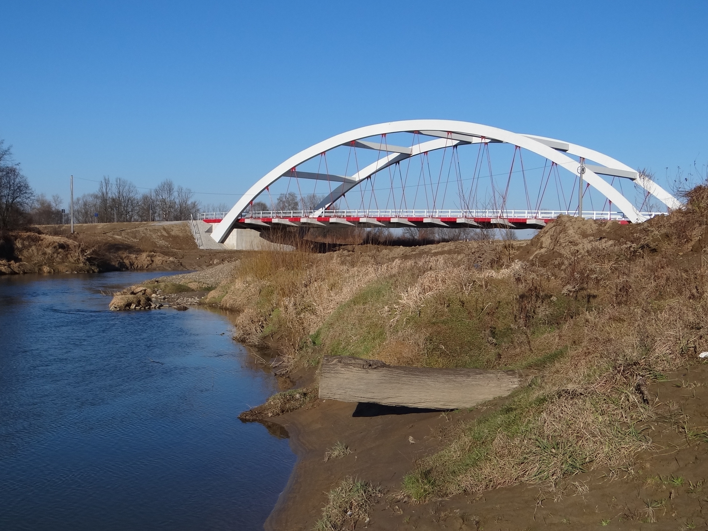 Rzeka Stradomka w Stradomce